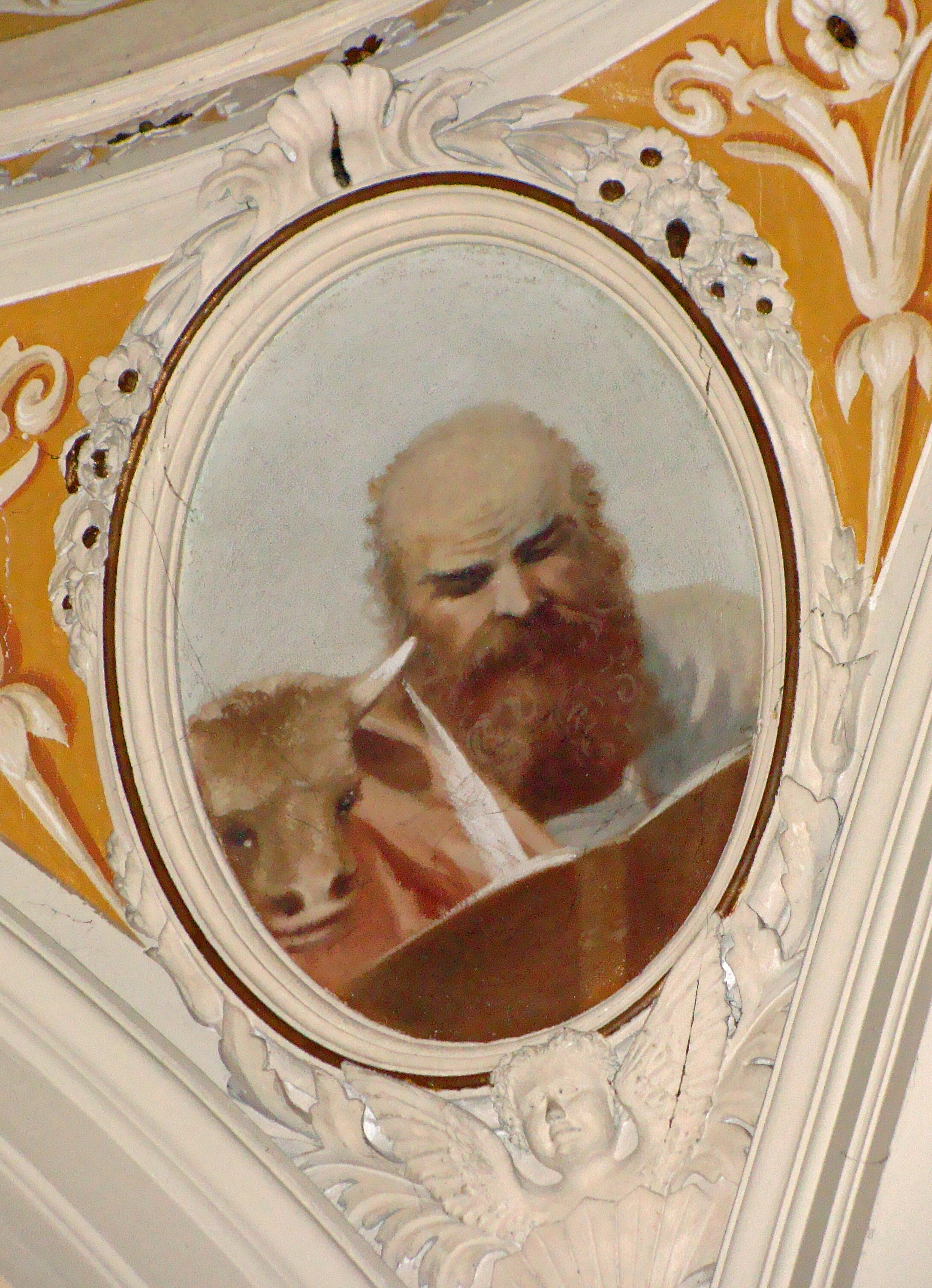 Tita Gori, fresque du choeur de l'église de Monteprato (Italie) représentant saint Luc.